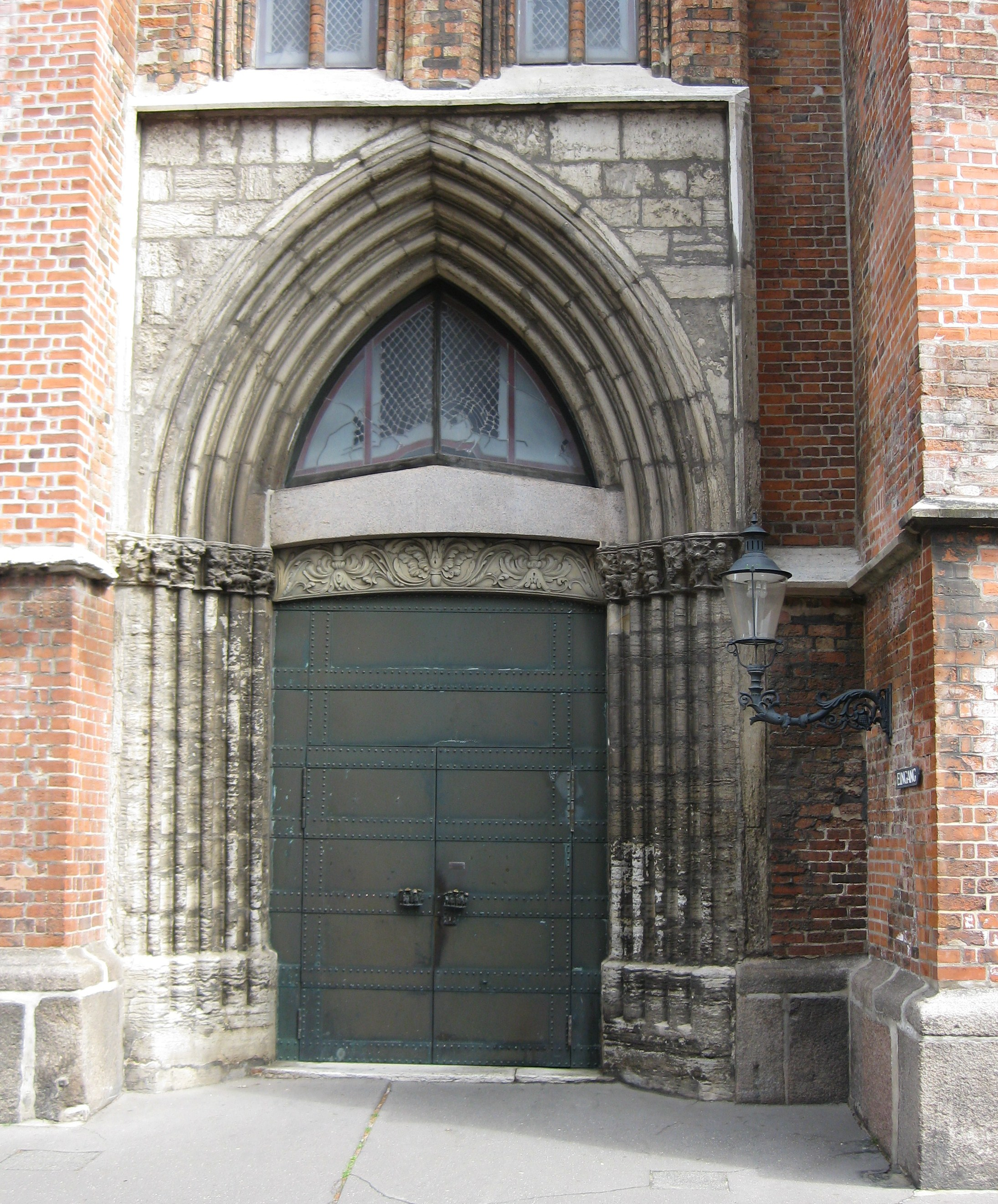 Lübecker Marienkirche: Portal der Briefkapelle an der Südseite.